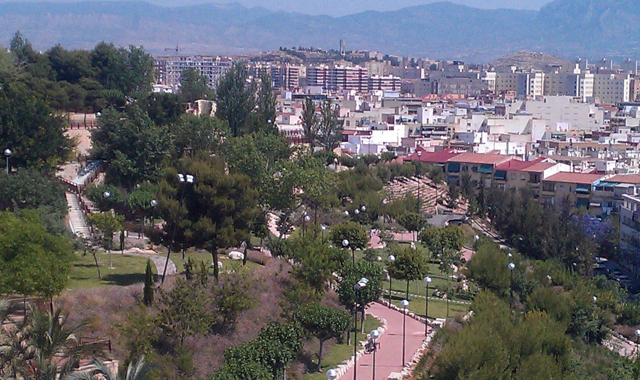 Parque Castillo de San Fernando, Alicante